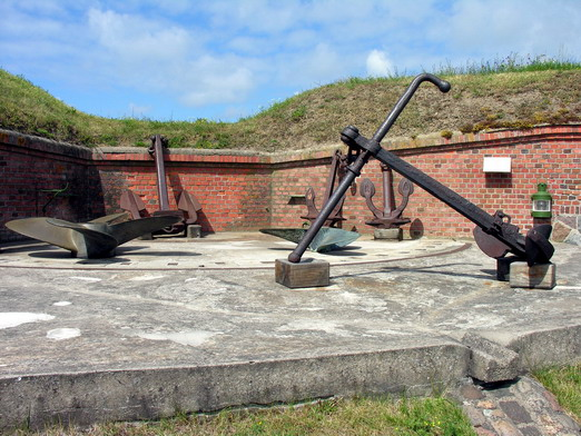 Lietuvos jūrų muziejus Foto: Algirdas, 2006 m. birželio 29 d.